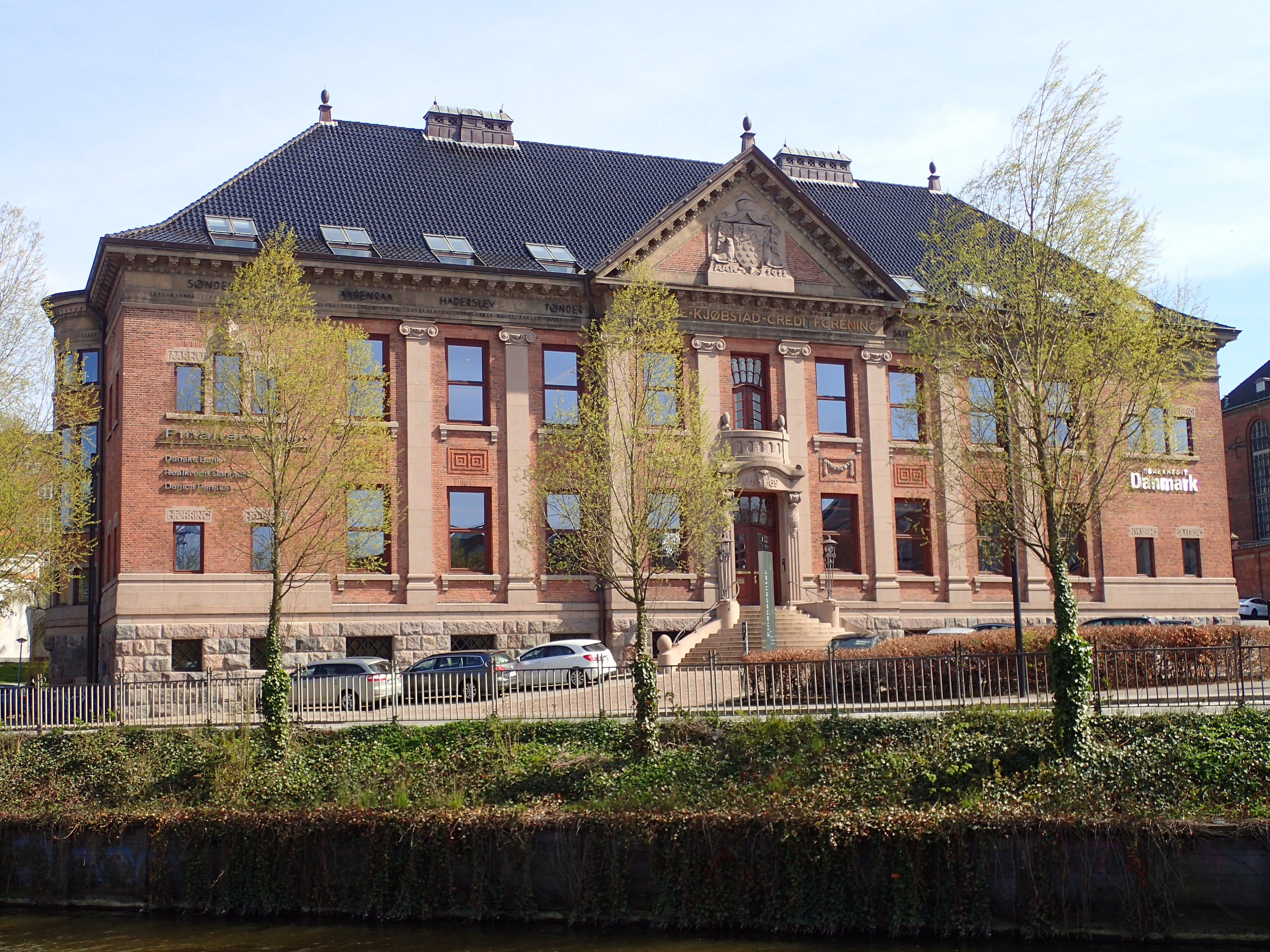 Ny jydske Kjøbstad-Creditforening, Aarhus.